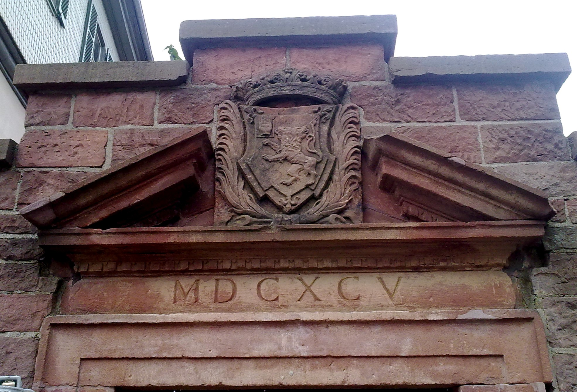 Wappen der von Curti aus der abgerissenen Curti'schen Kapelle des Umstädter Friedhofs (Teile des Türgewandes) im offenen Giebel des Toreinganges der östlichen Hofseite in der südlich zur Georg-August-Zinn-Straße verlaufenden Begrenzungsmauer des Pfälzer Schlosses. Datierung: 1695. Ob ein Bezug darauf genommen werden soll, dass die von Curtis zweimal einen Oberamtmann als Verwalter der Kurpfälzer Hälfte Umstadts stellten, ist nicht bekannt.